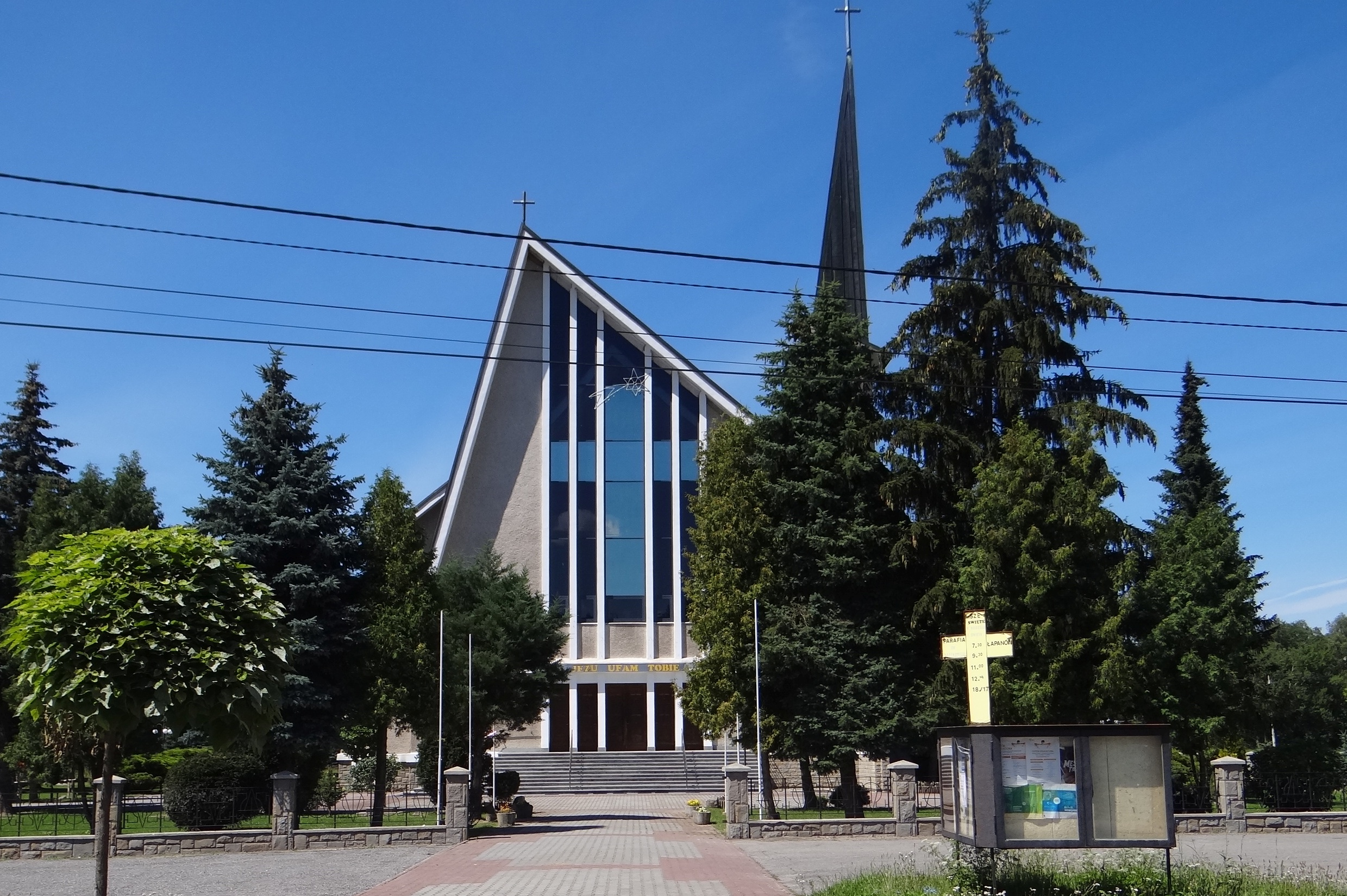 Kościół w Łapanowie